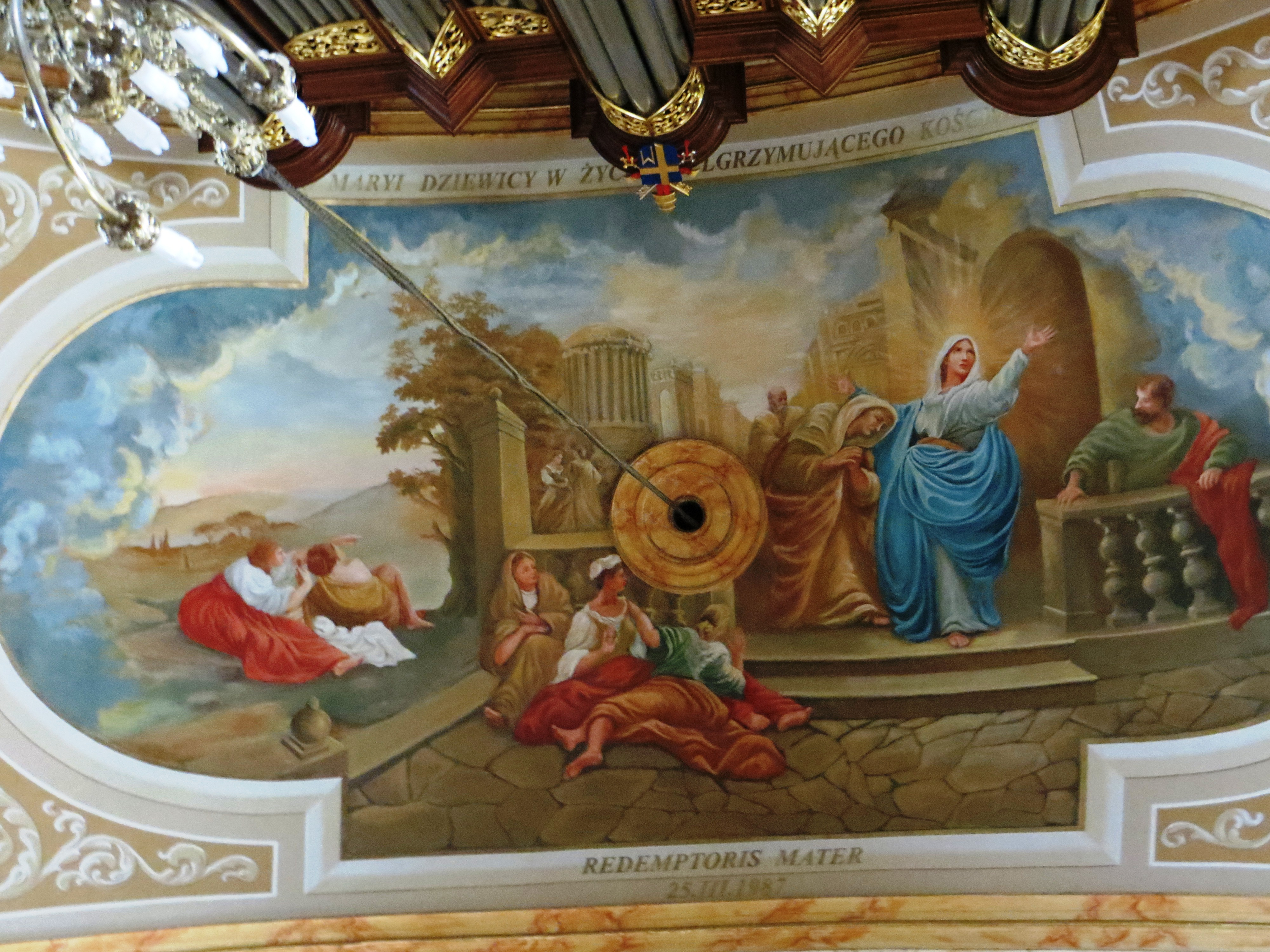 Malowidła na suficie w bazylice ONMP w Wadowicach.